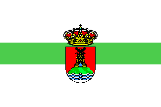 Bandera de Perales de Tajuña, en Madrid (España)